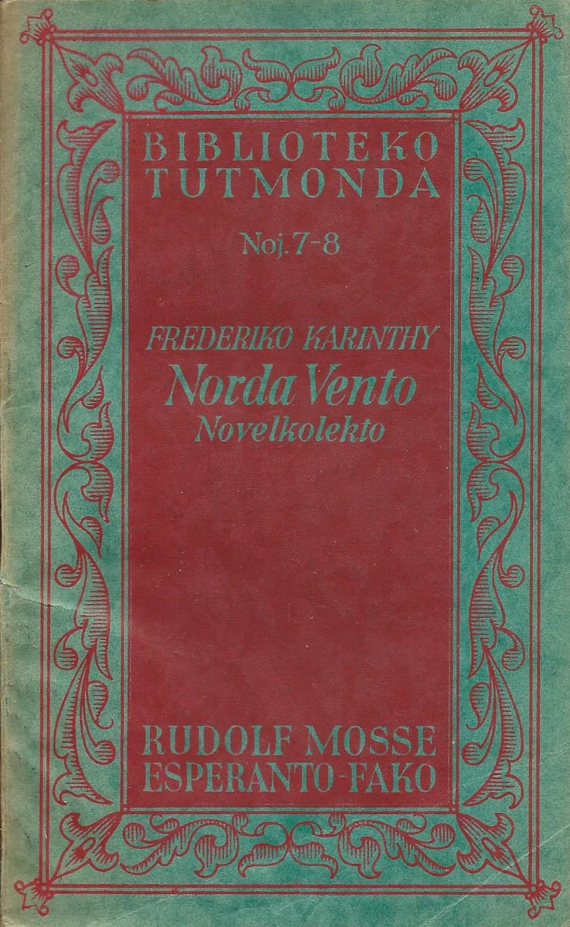 Norda Vento